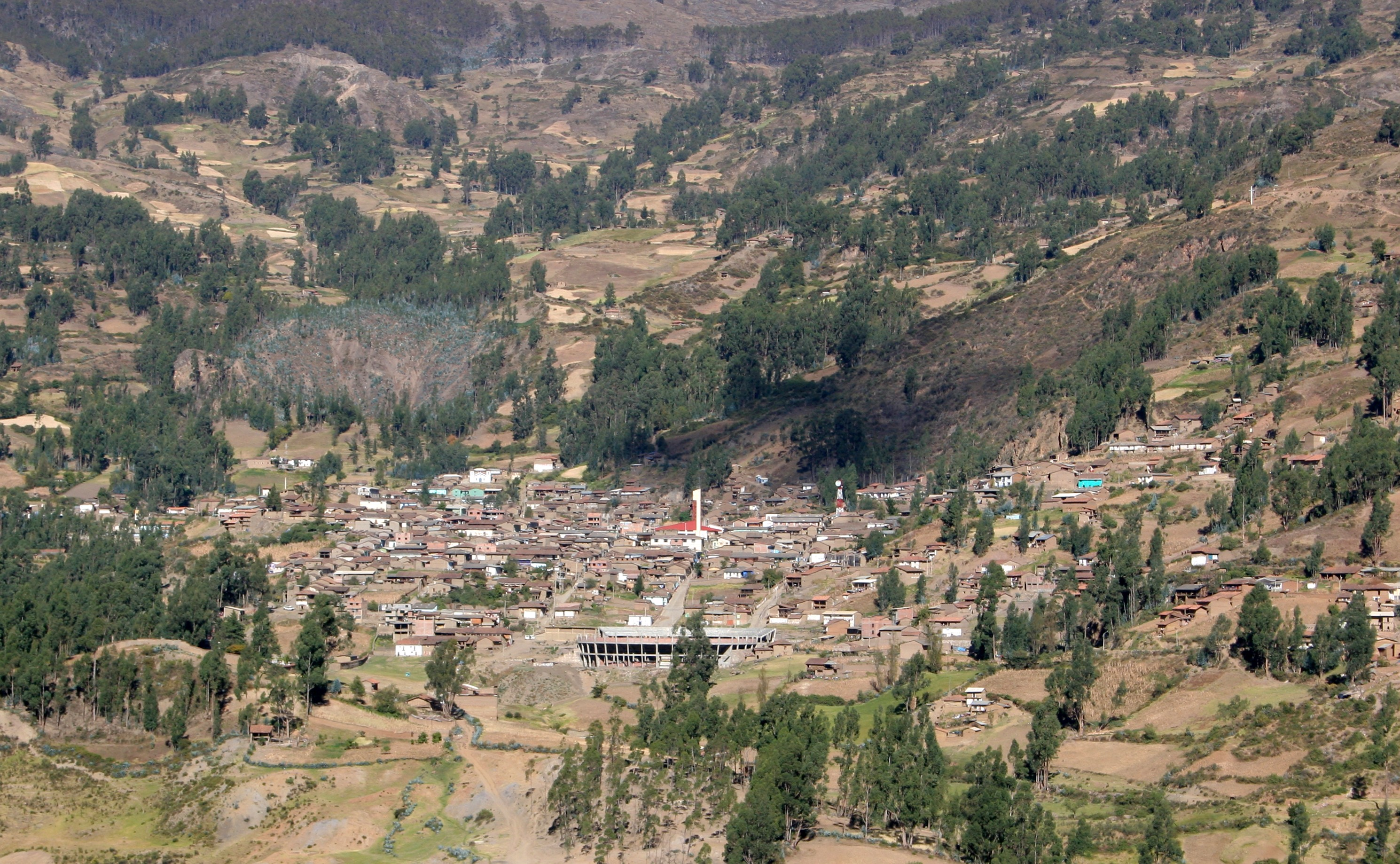 Vista panorámica de Huari, Ancash, Perú.